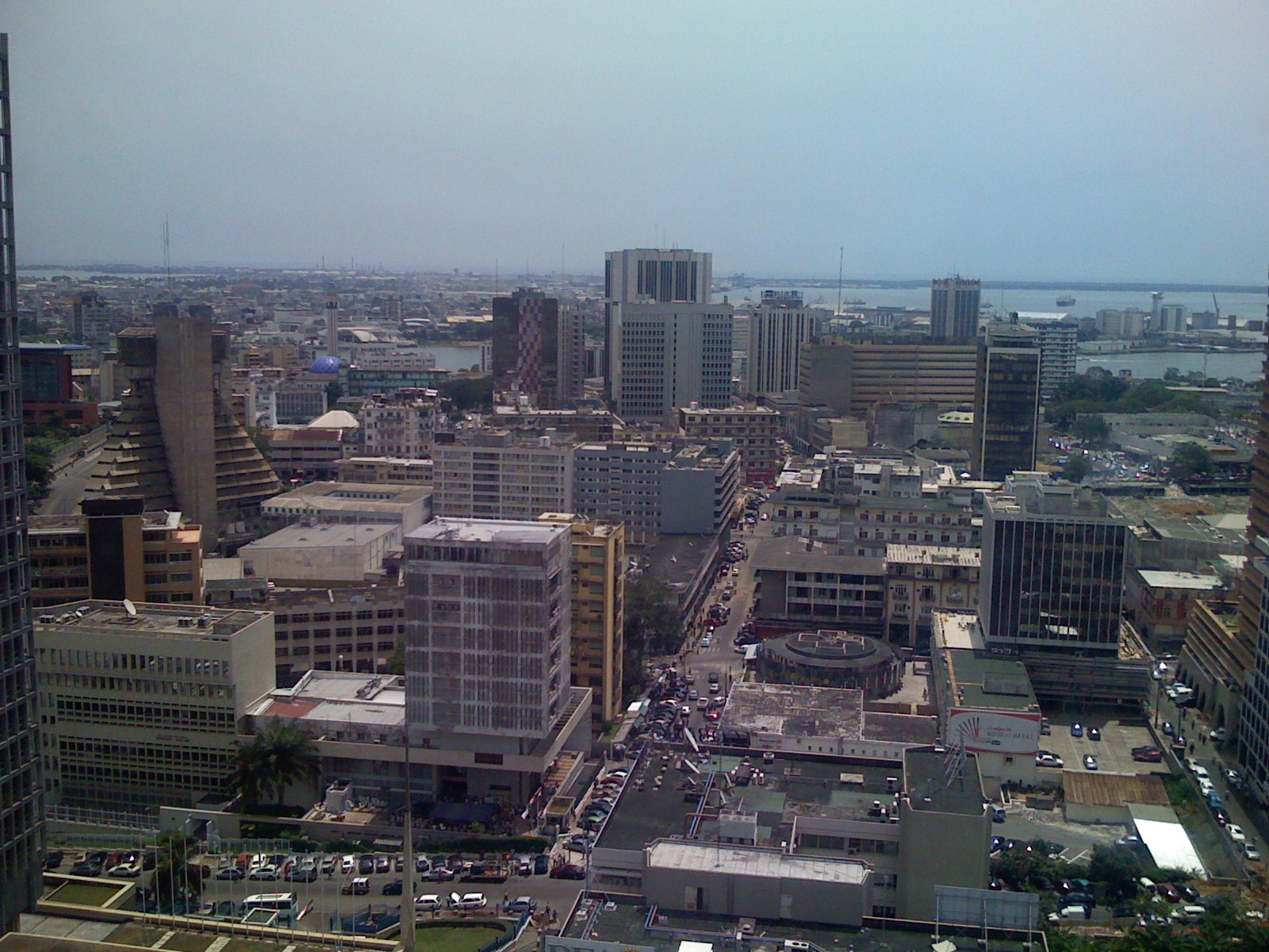 Vue aérienne d'Abidjan, quartier Plateau (Côte d'Ivoire)